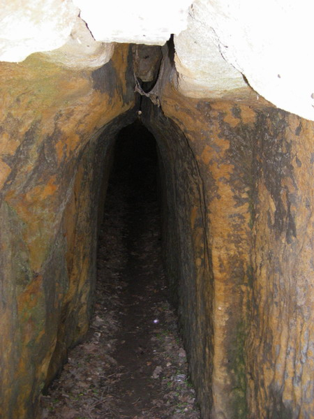 vstup do prostoru hradu je mozny temer vylucne touto chodbou